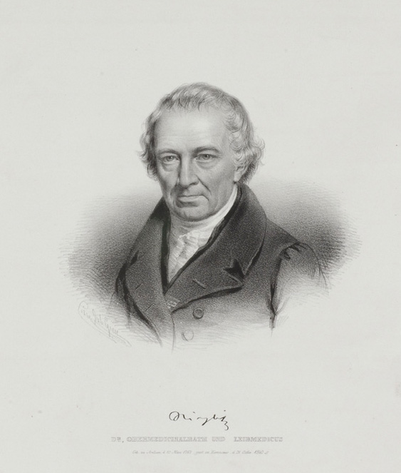 Johann Stieglitz, Hannoverischen Dr. Obermedicinalrath and Leibmedicus (1767-1840)